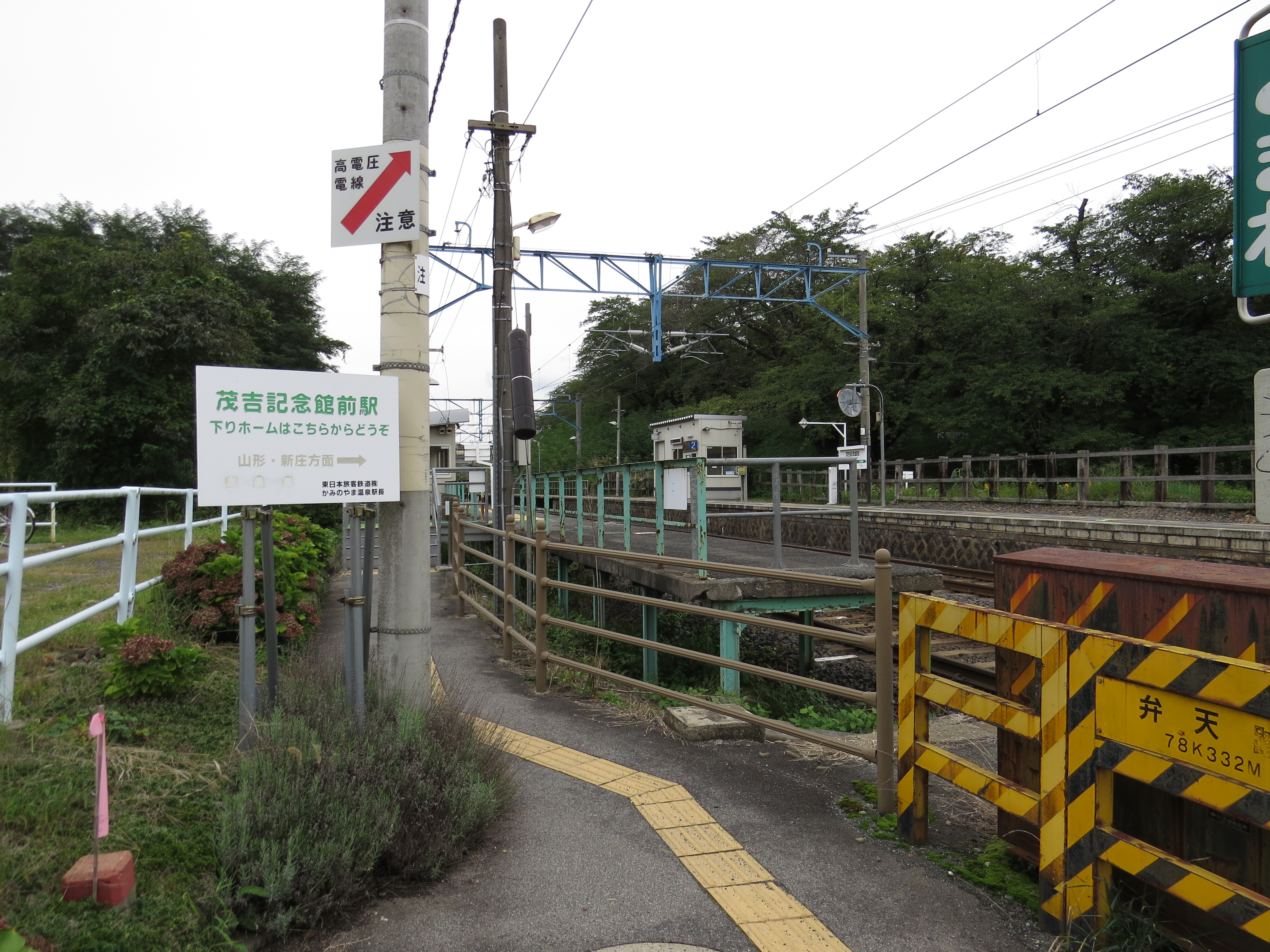 JR東日本 茂吉記念館前駅 入口